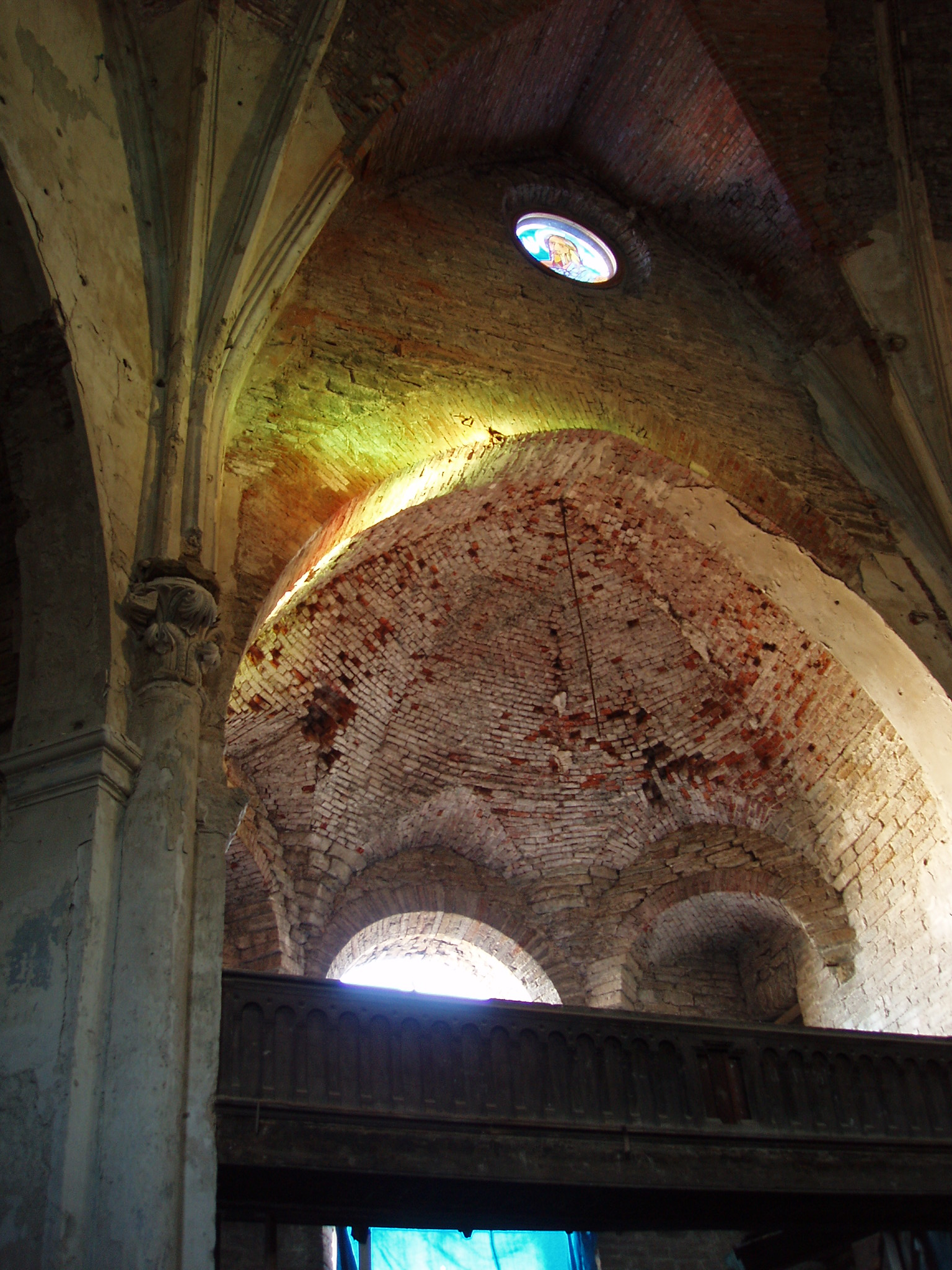 Narva Aleksandri Suurkirik